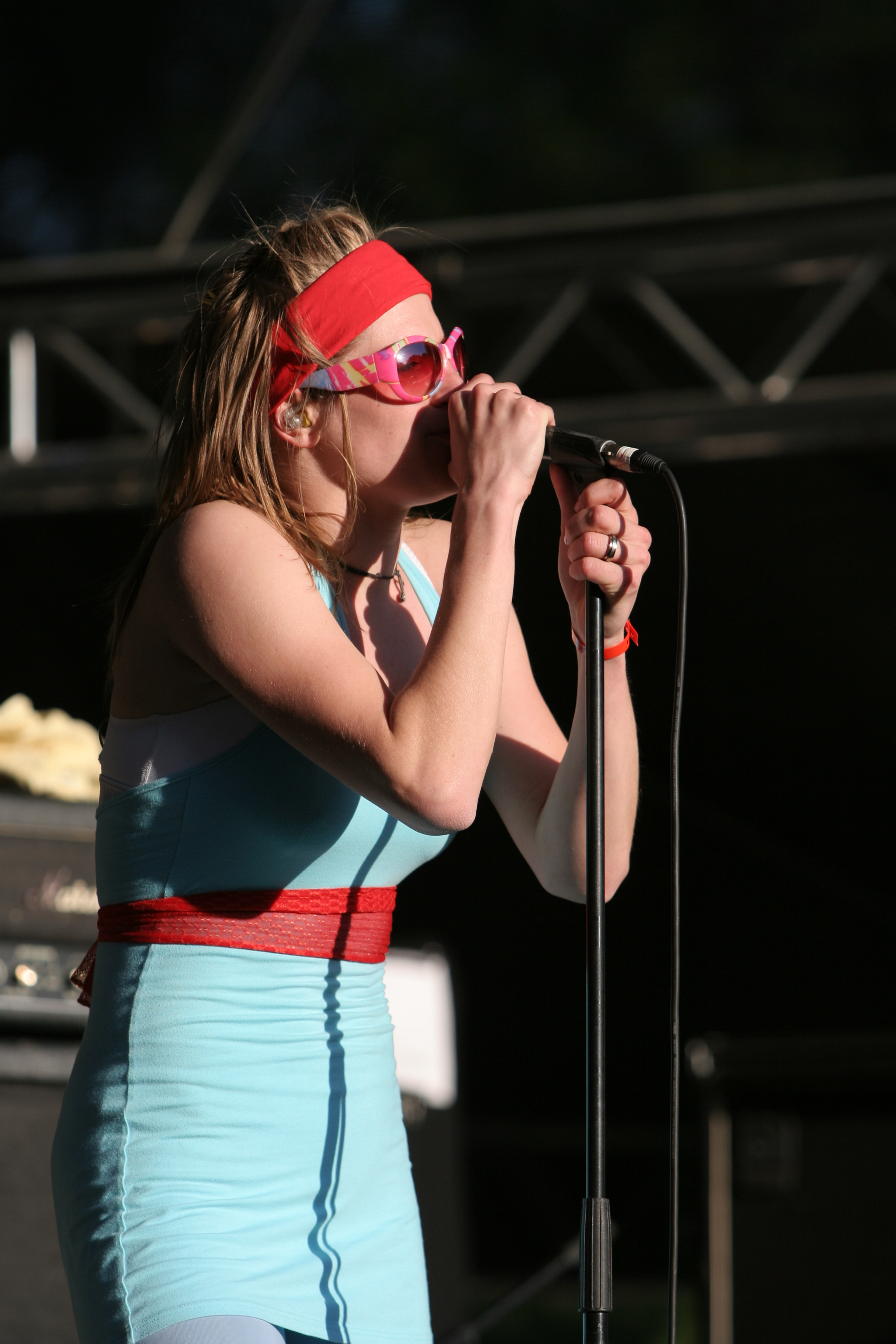 Marka Rybin from Gaia Mesiah at Prague's Majáles